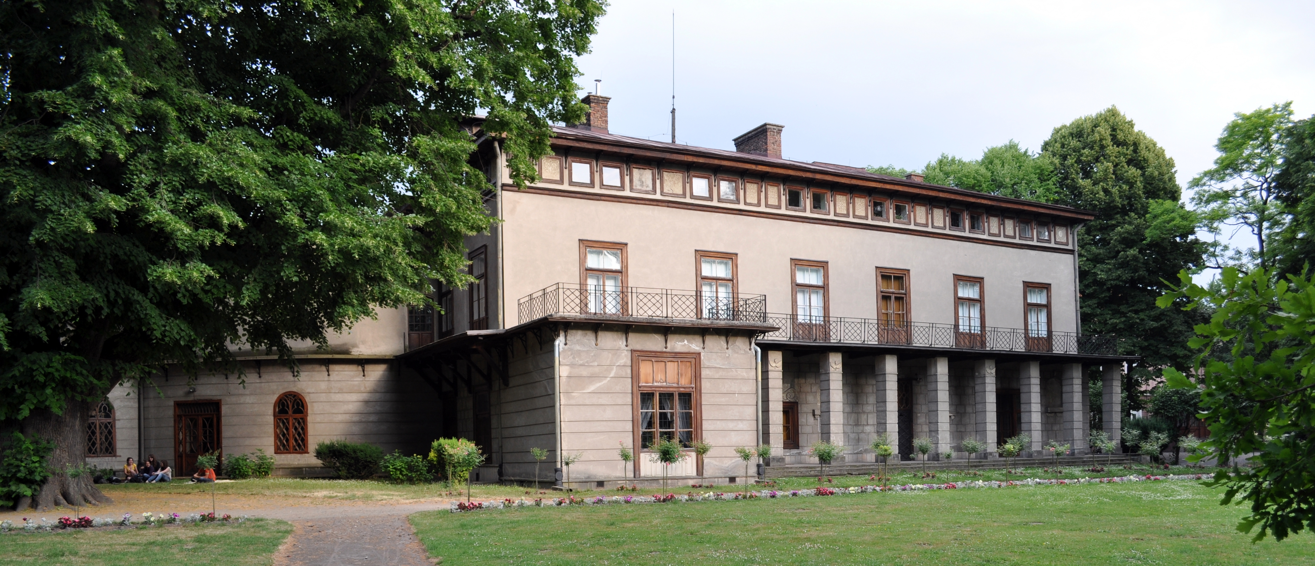 pałac Lubomirskich w Przeworsku